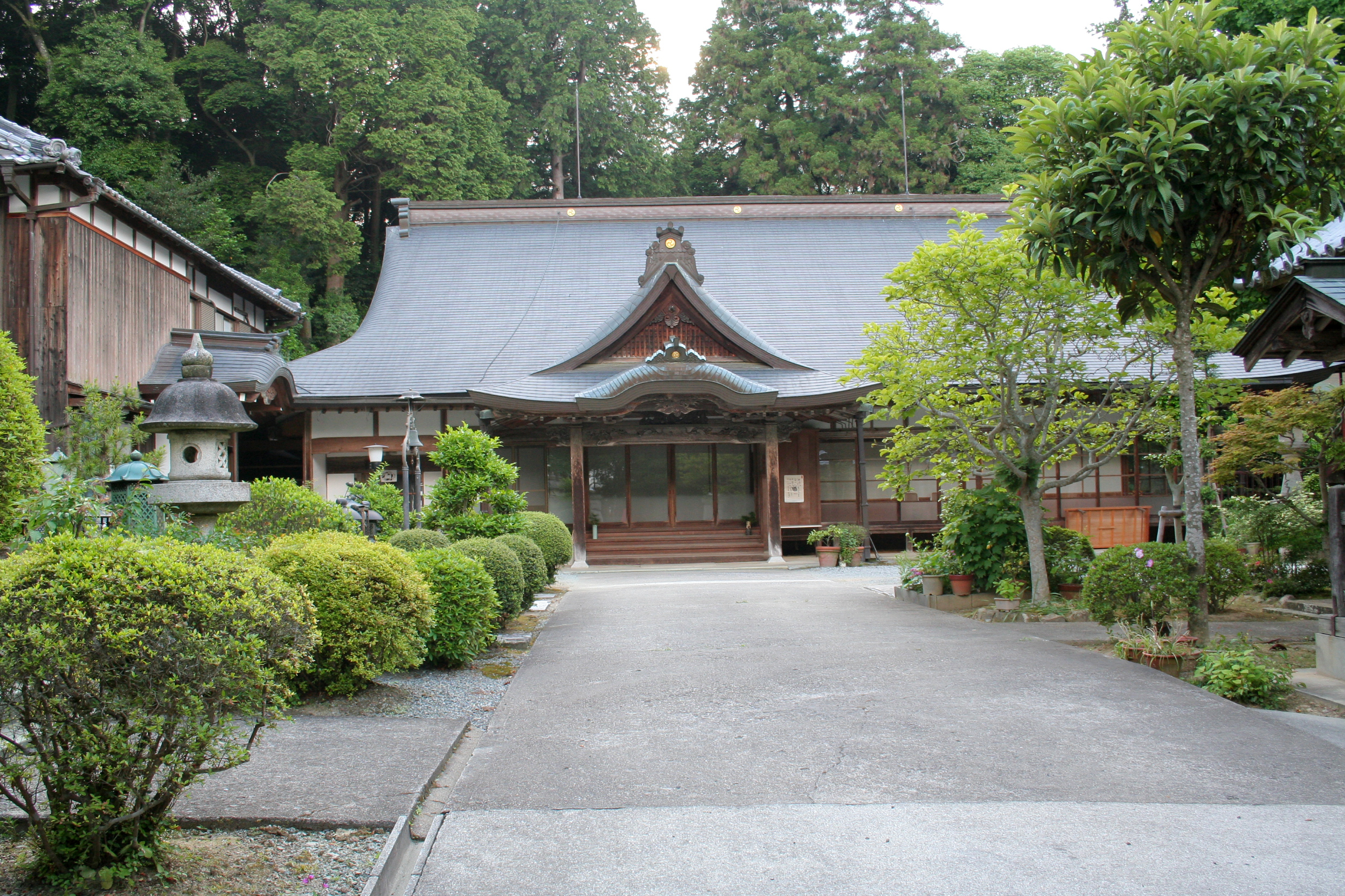 兵庫県加東市にある仏教寺院。光明寺。 大慈院の本堂。